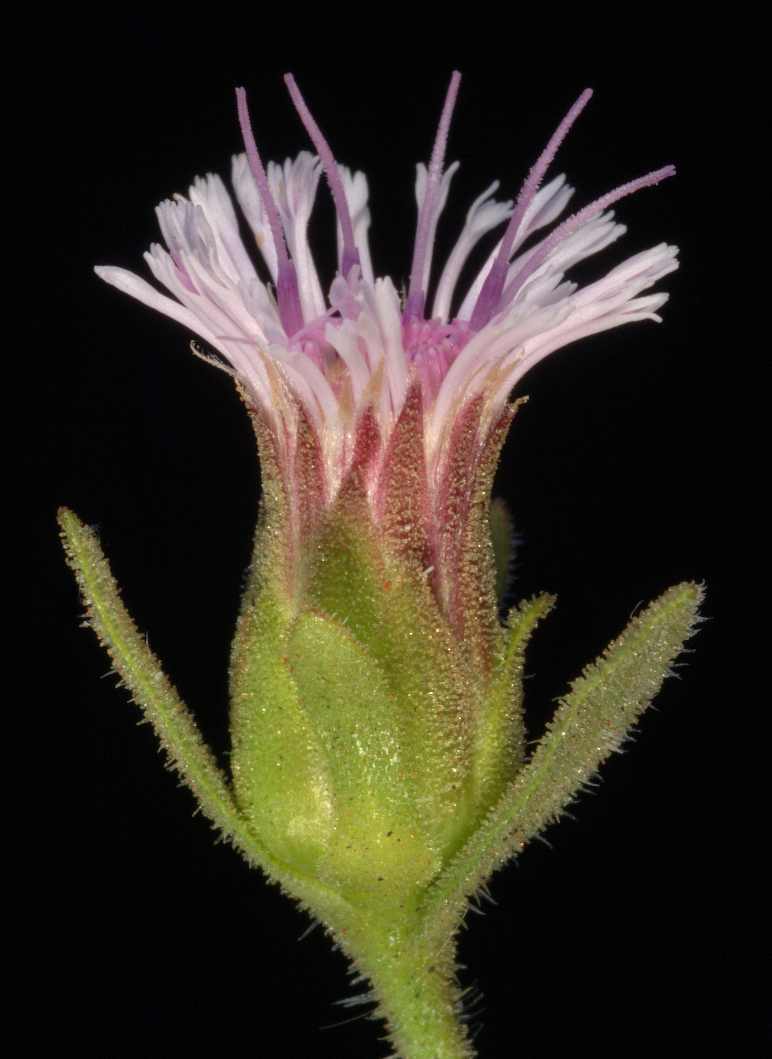 KRT3642